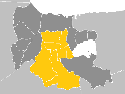 Distrito Metropolitano Valencia (Venezuela)